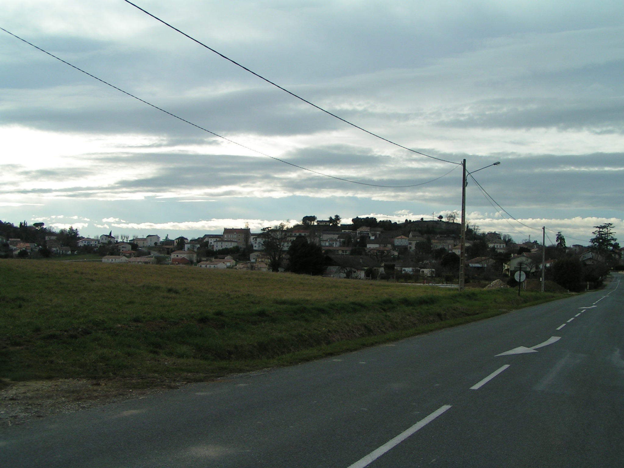 Cancon